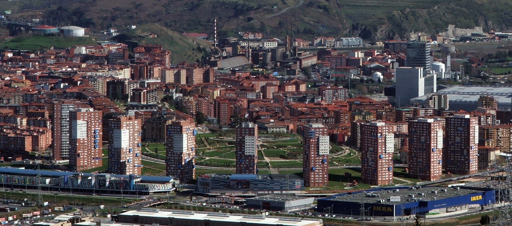 Torres de San Vicente en Barakaldo. Detrás Barakaldo y (arriba)Erandio. En la esquina de abajo a la izquierda, Aparcavi (Sestao).